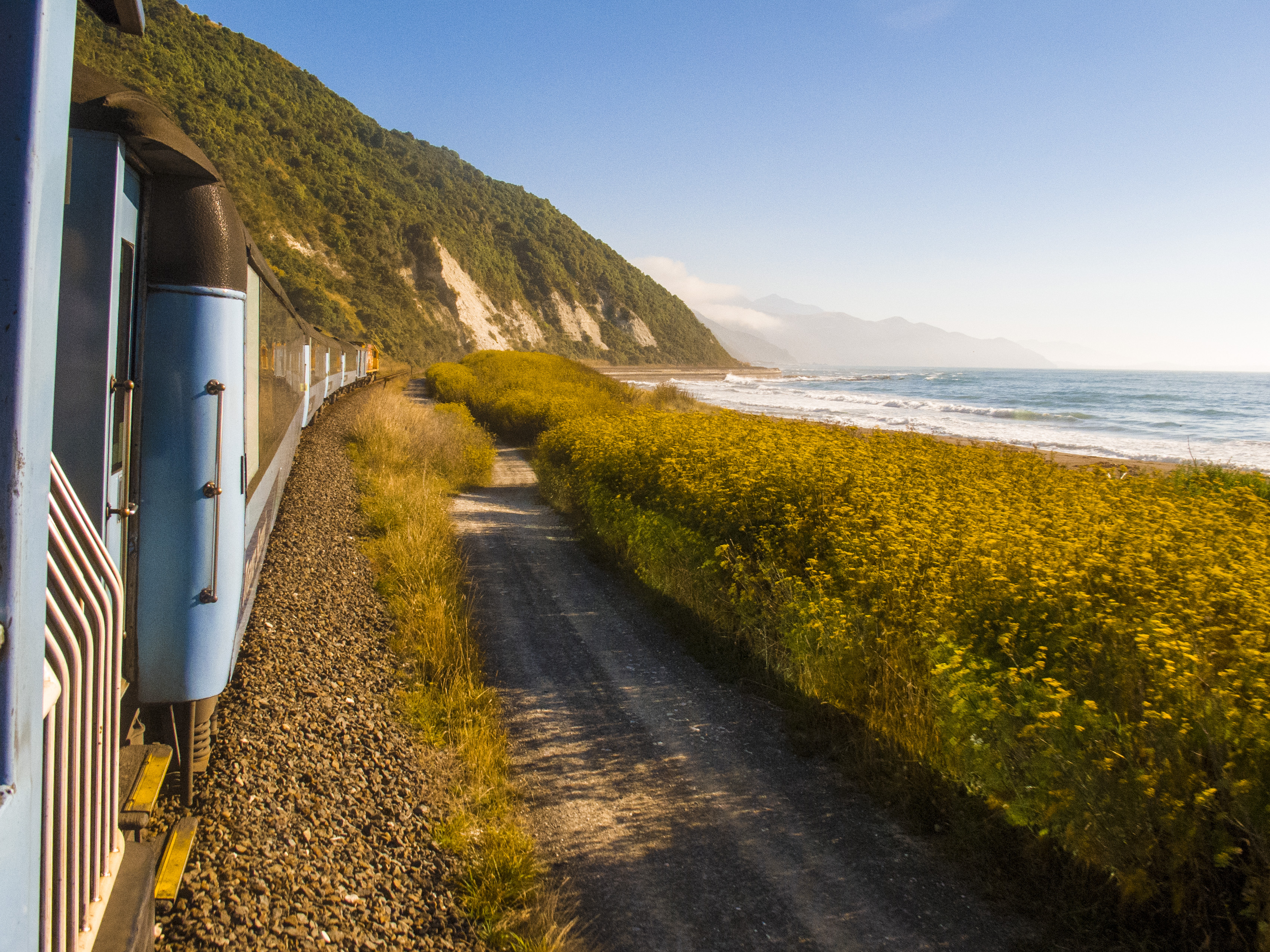 KiwiRail CoastalPacific